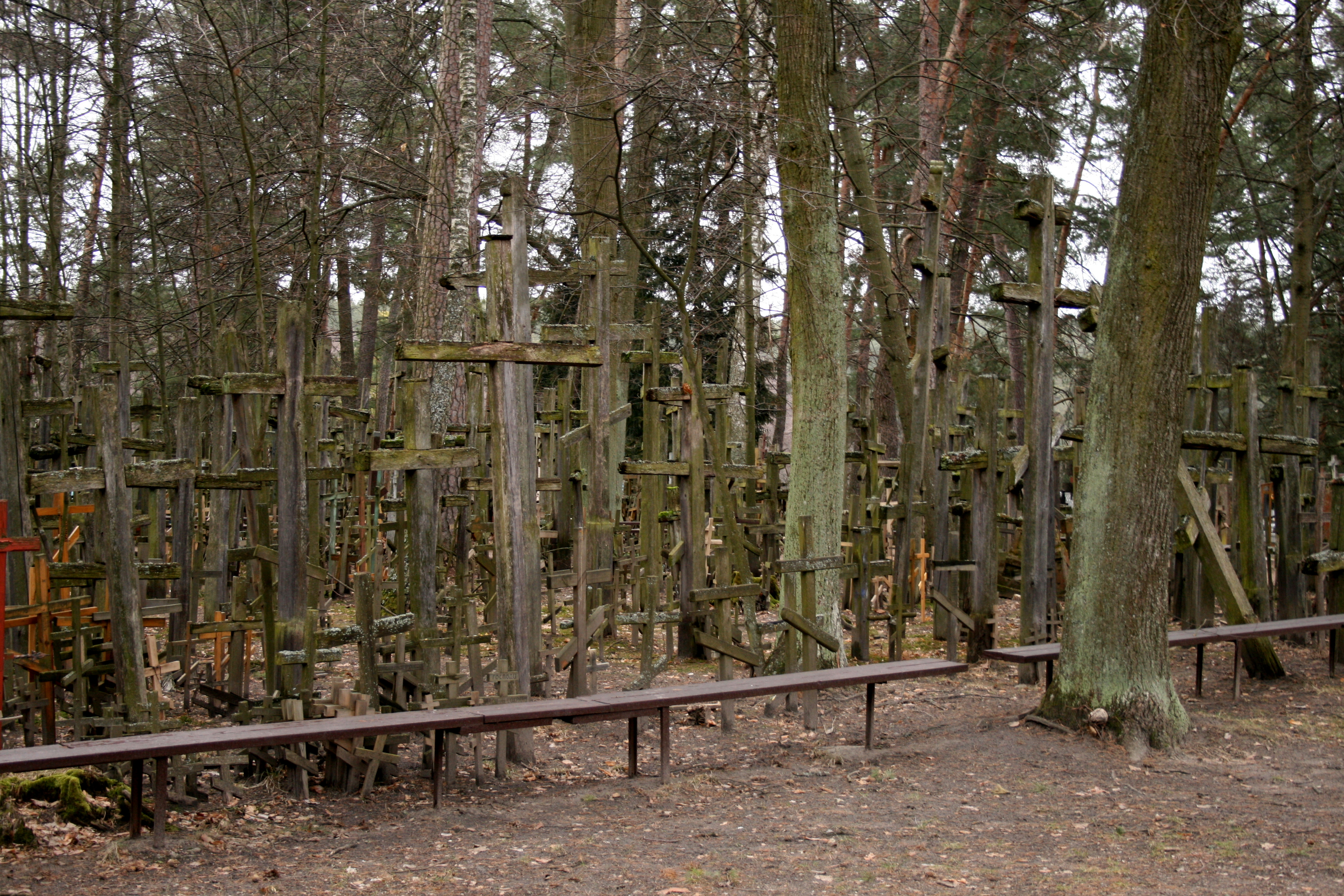 Krzyże na Grabarce